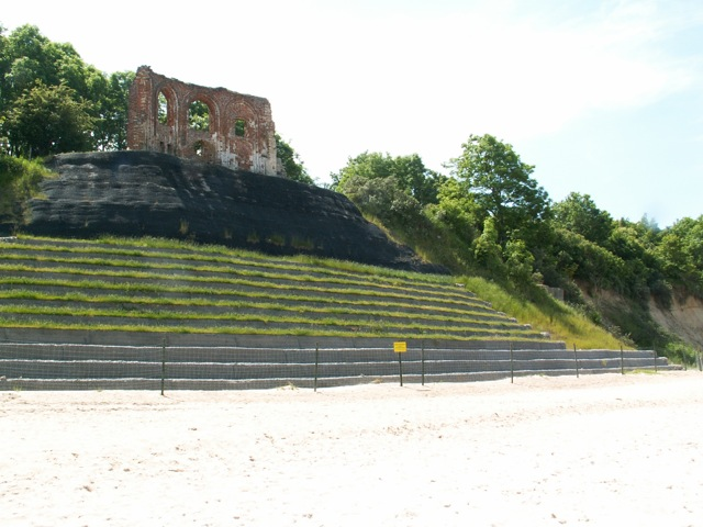 Church ruins in Trzęsacz